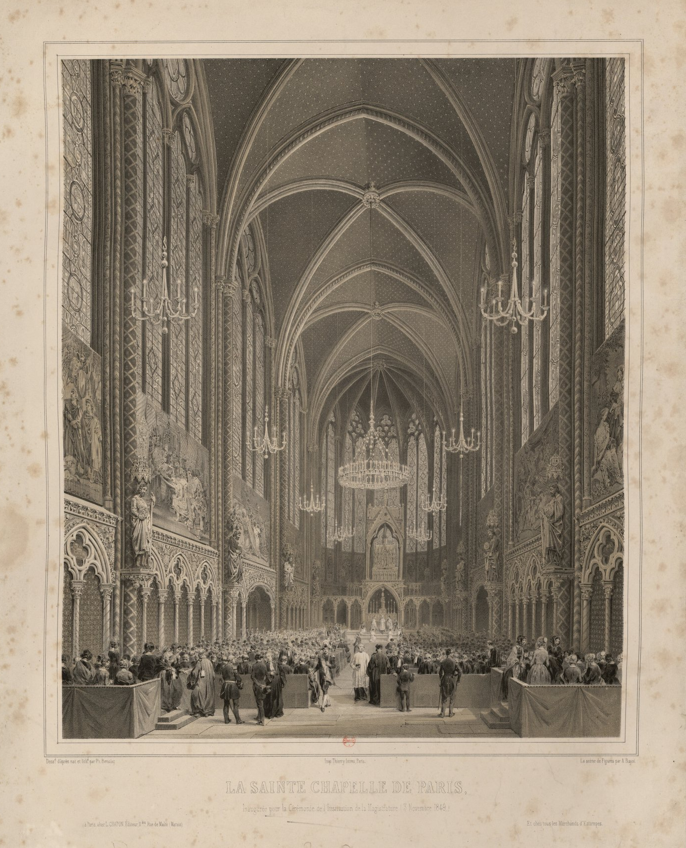 La Sainte-Chapelle de Paris, inaugurée pour la cérémonie de l'Institution de la Magistrature (3 novembre 1849).